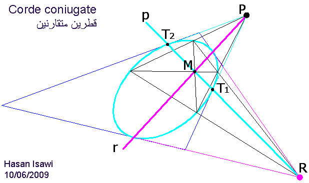 link* My personal site Licensing تصنيف:هندسة وصفية